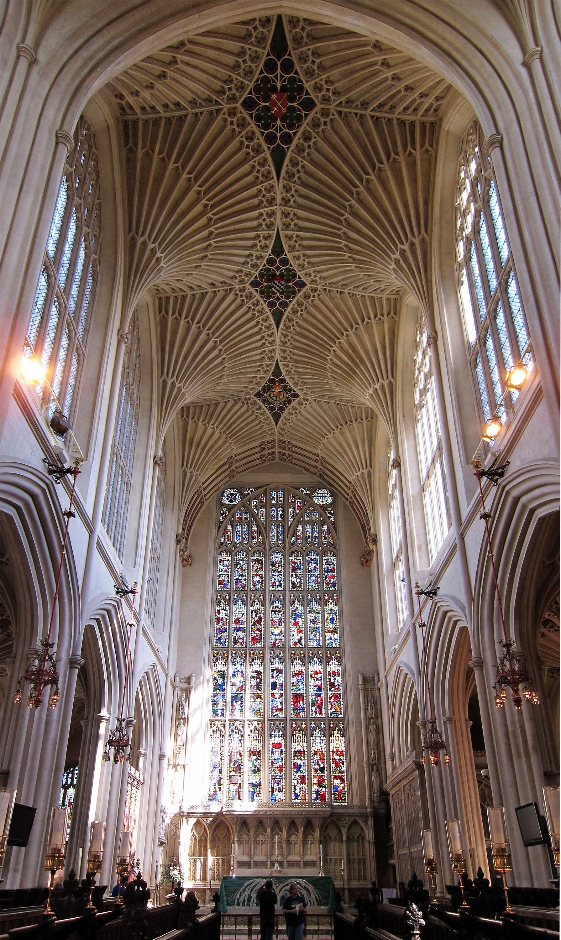 Le choeur de l'abbaye de Bath.